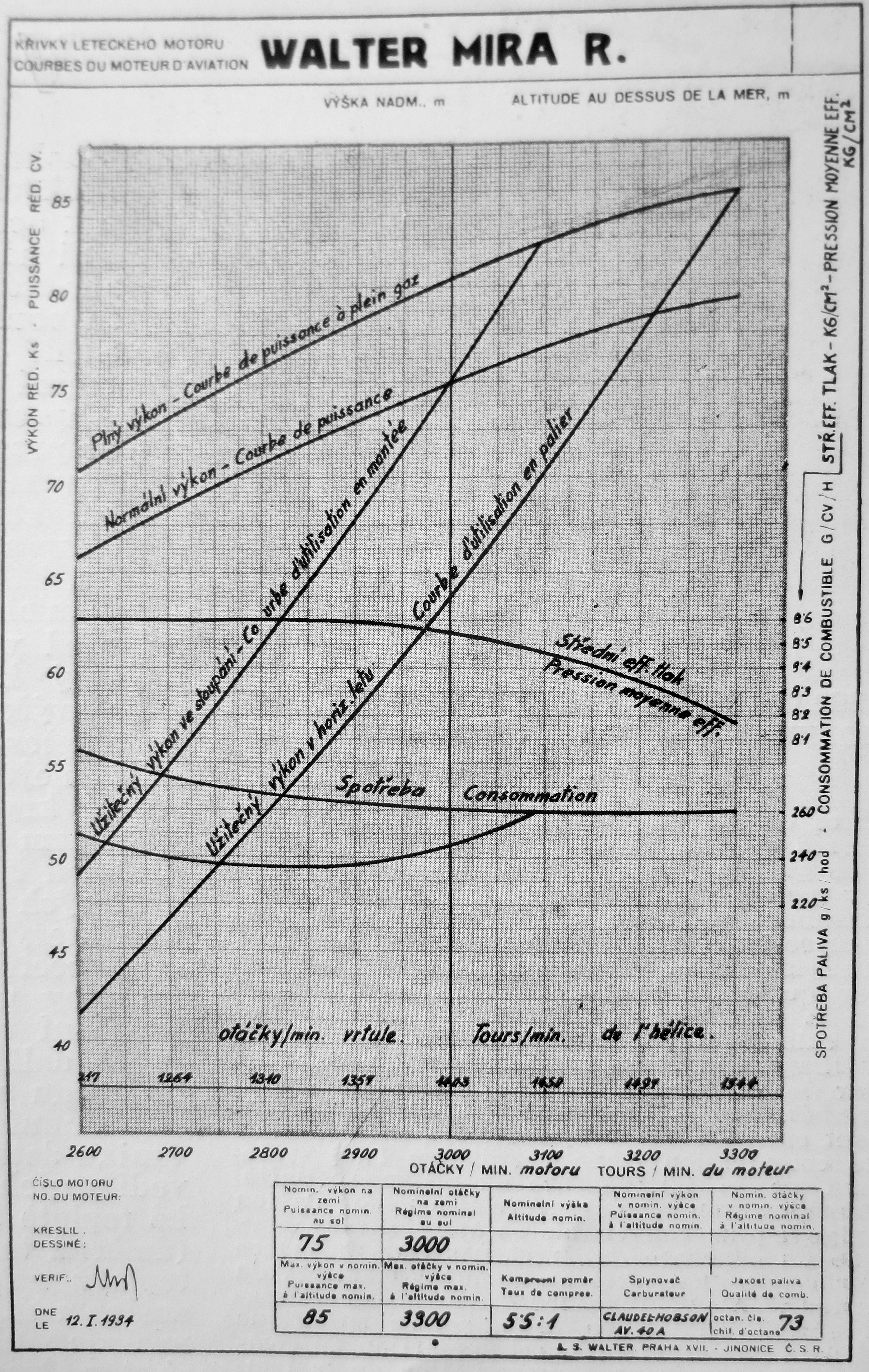 Walter Mira-R charakteristiky (1934)